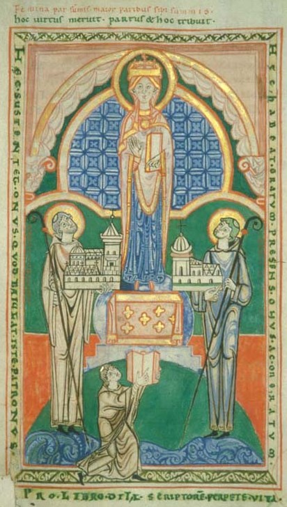 La Vierge, l'abbé de Saint-Vaast et Etienne Harding, prophétie de Jérémie, vers 1125.